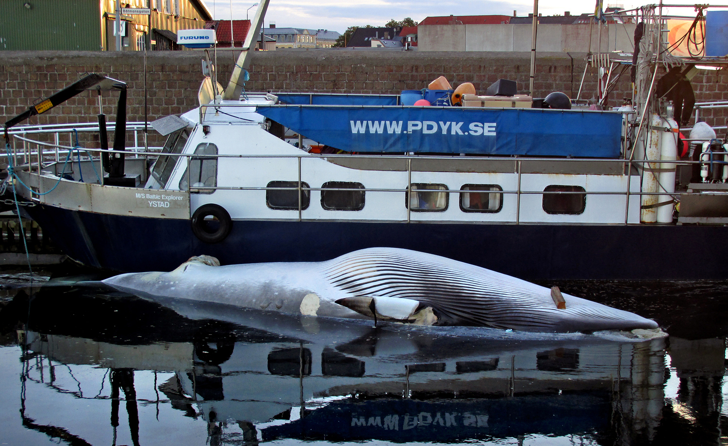 En död Vikval hittades ca 1 mil söder om Ystad 17 aug 2016 av Ystadsfiskaren Björn Ulups, den bogserades in till Ystads småbåtshamn av dykaren Patrik Juhlin. Efter beslut av Ystads kommunledning 22 aug, sänktes valen den 31 aug med 1,2 ton järnvägsräls ca 6 km söder om Ystad, och förankrades vid vraket SS Pan, för att användas i forskningssyfte.